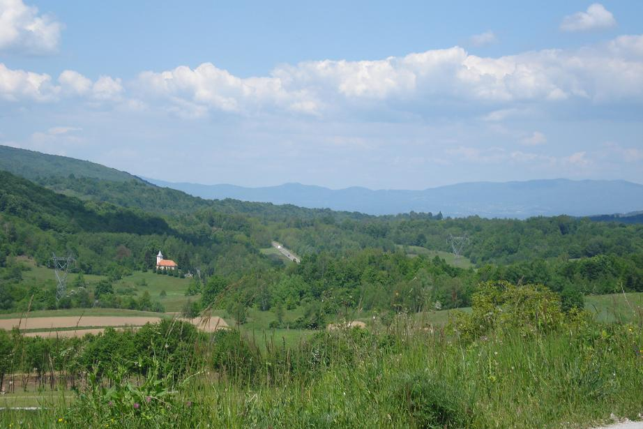 Pogled iz Netretića na Veliki Modruš Potok